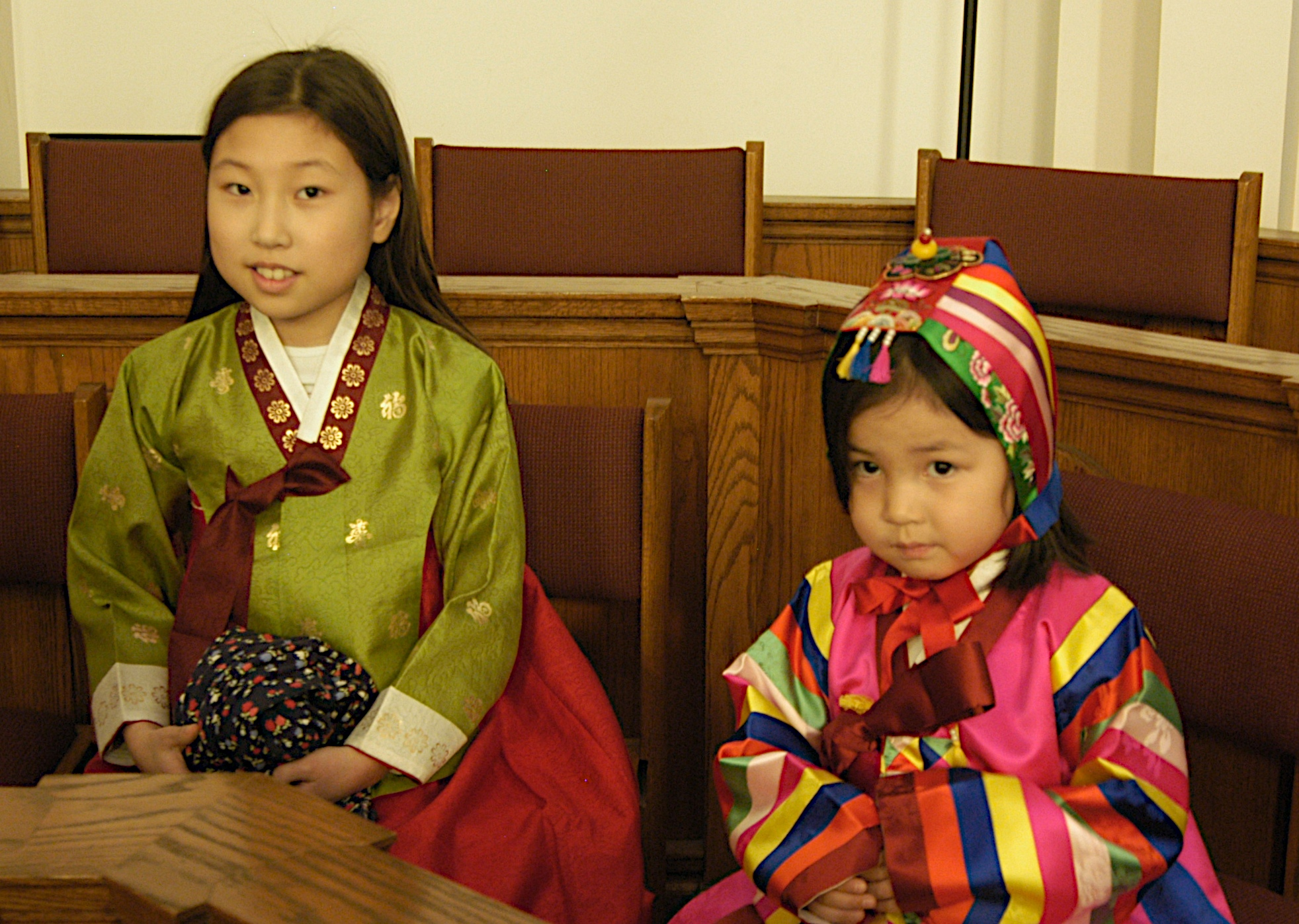 Children in Hanbok